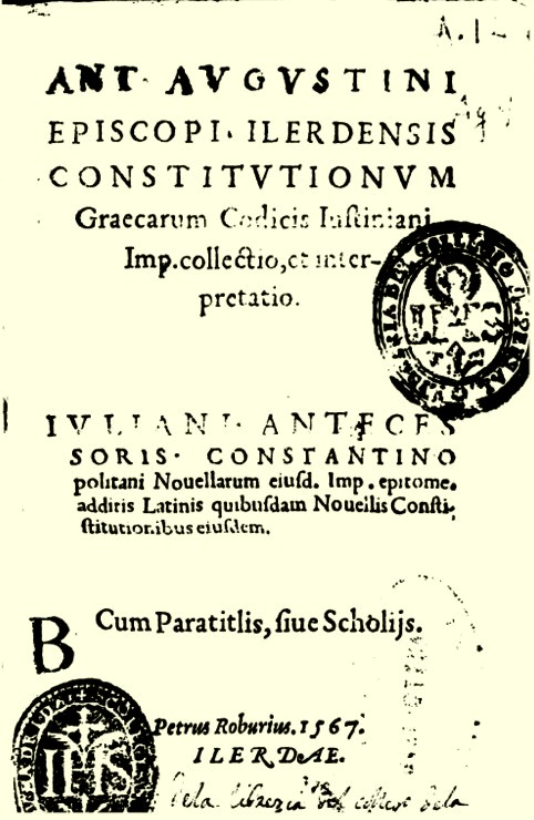 Portada de l'obra "Constitutionum graecarum codicis Justiniani imperatoris, collectio et interpretatio. Juliani Antecessoris constantinopolitani novellarum ejusdem imperatoris epitome, additis latinis quibusdam novellis constitutionibus ejusdem. Cum paratitlis, siue scholiis" d'Antoni Agustí i Albanell. Ilerdae (Lleida) : Petrus Roburius, 1567.